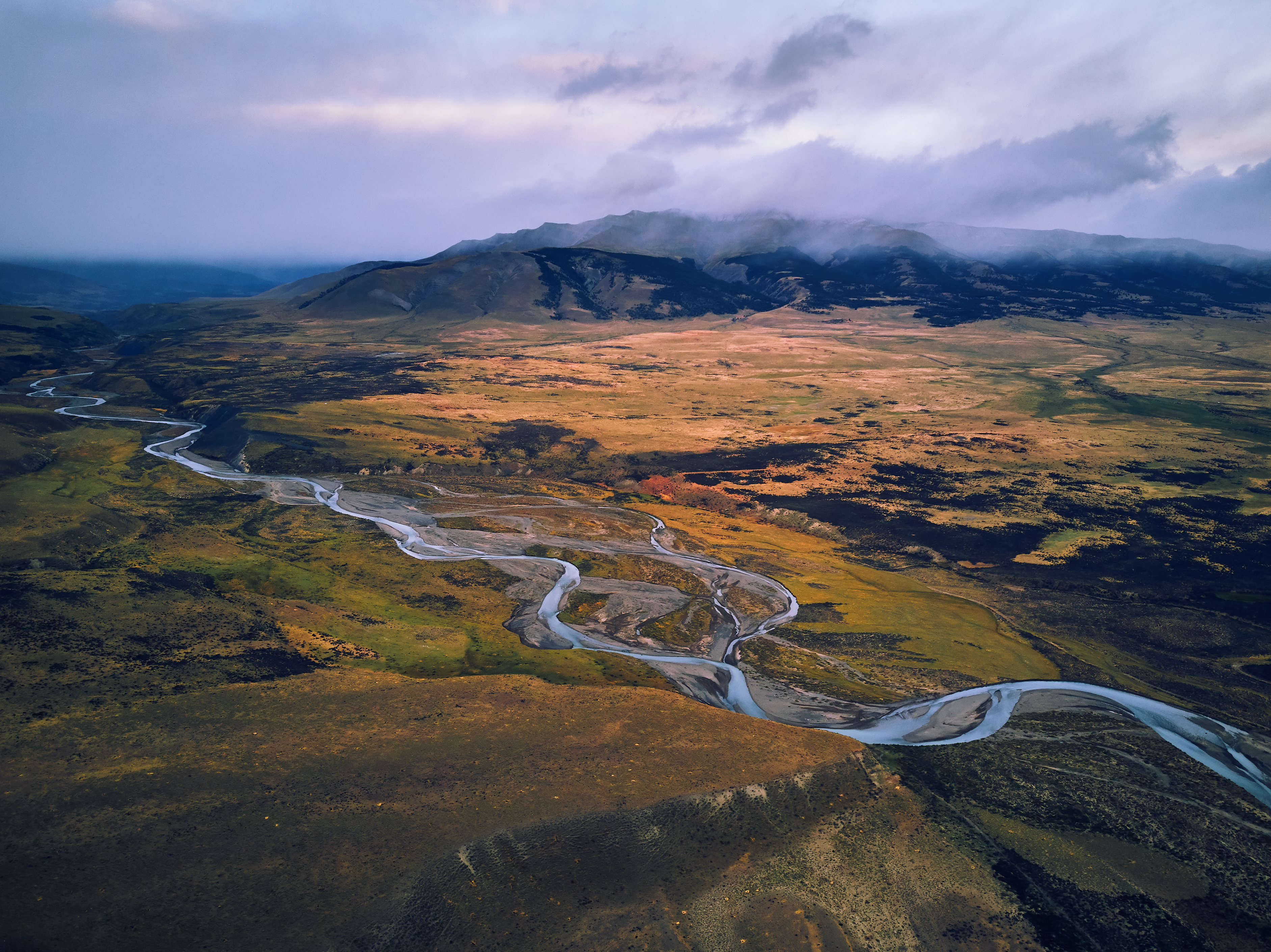 Río de las Chinas, Patagonia, Chile